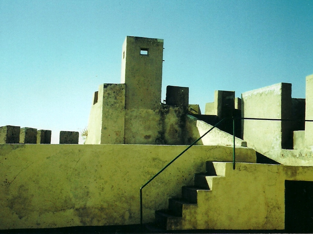 Forte de Almada, freguesia e concelho de Almada, distrito de Setúbal, Portugal.